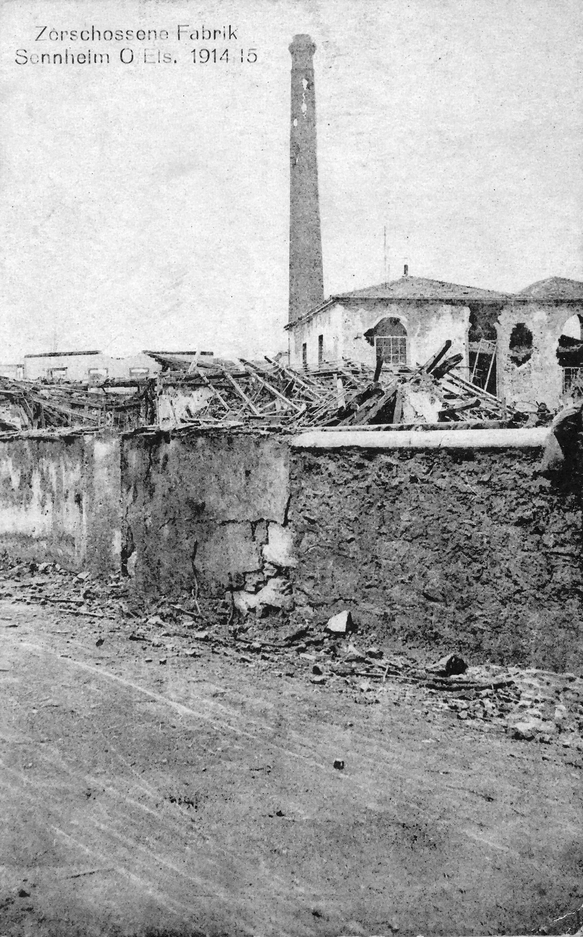 Feldpostkarte aus dem Jahre 1914 mit dem Titel "Sennheim: Zerschossene Fabrik 1914/1915"